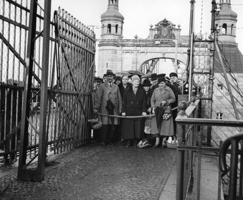 Tilsit (Ostpreußen) Memelbrücke nach Litauen